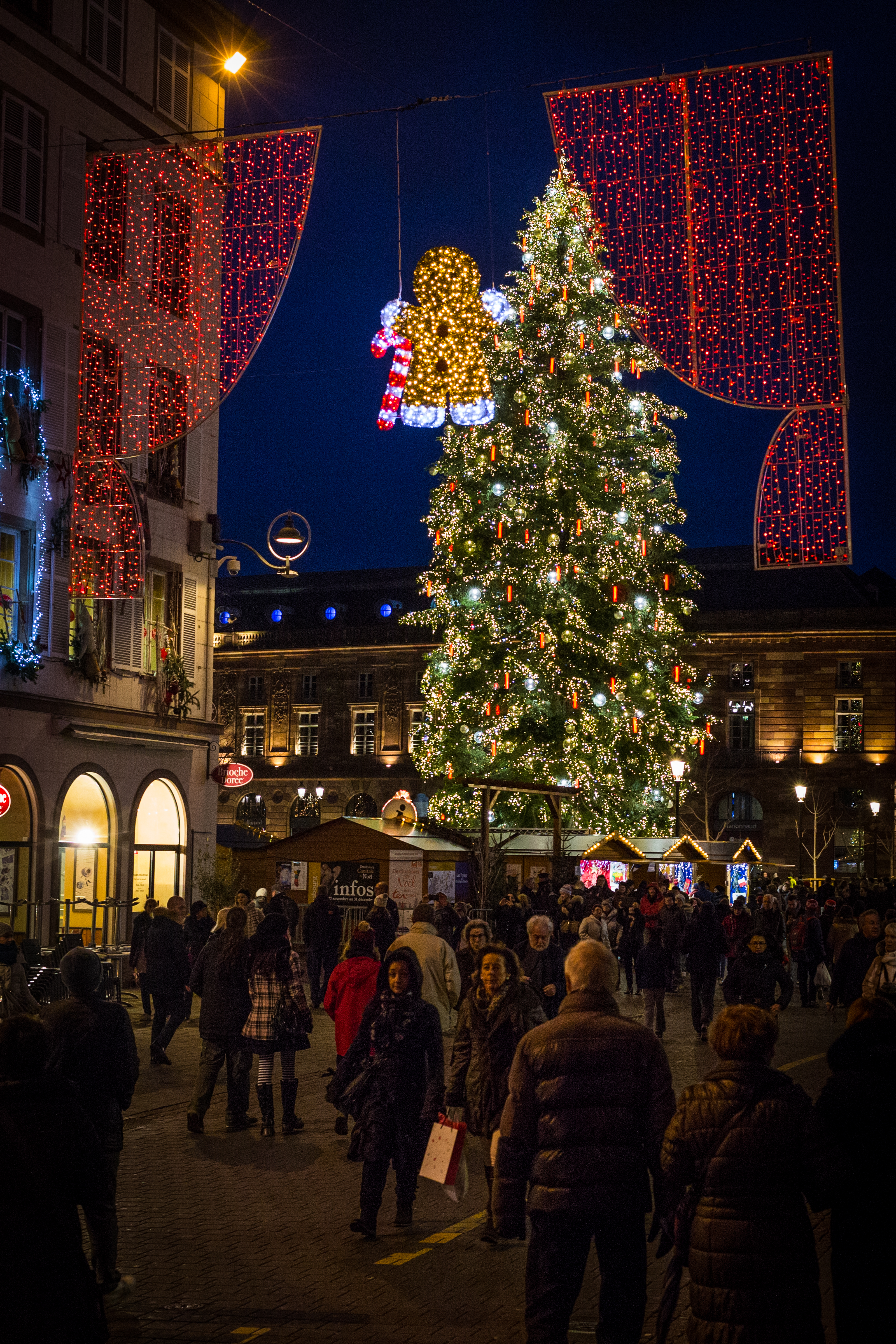 Strasbourg capitale de Noël grand sapin 2015